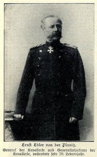 Ernst Edler von der Planitz (General), 70 Jahre alt